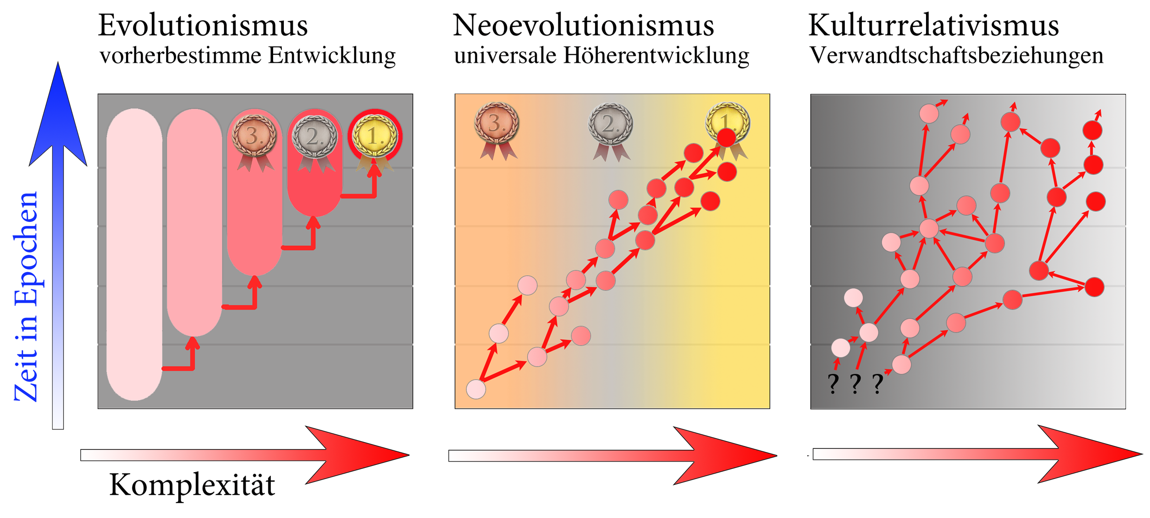 Drei (vereinfachte) soziokulturelle Evolutionsmodelle – evolutionistischer, neoevolutionistischer u. kulturrelativistischer Ansatz – im Vergleich